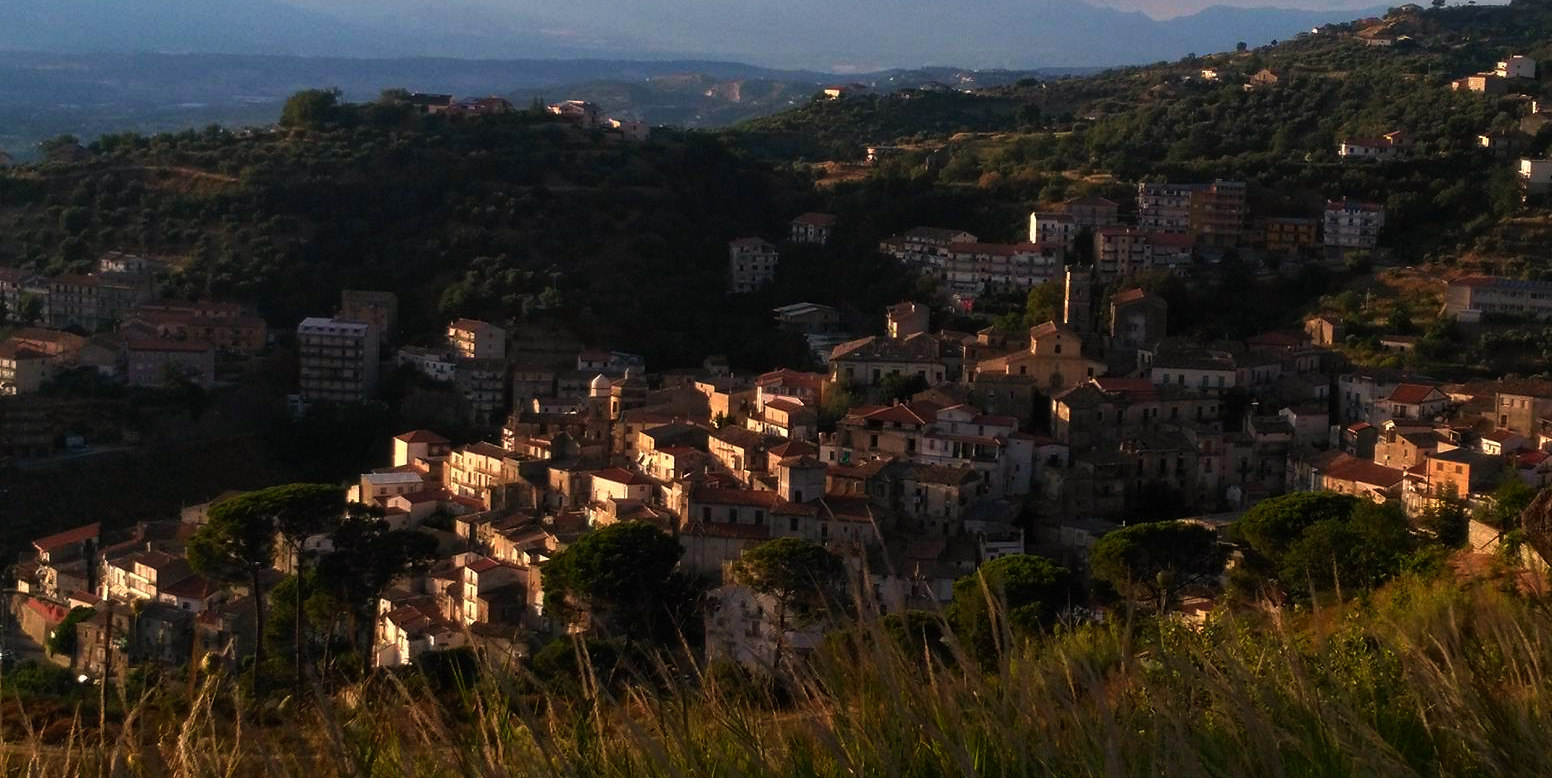 Vista di Luzzi